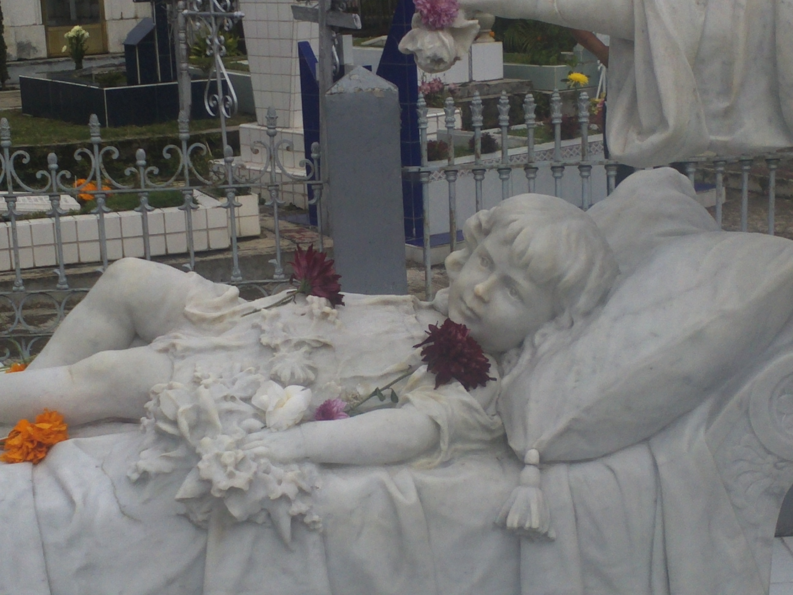 Niña del Angel 1 en el Panteón de Orizaba